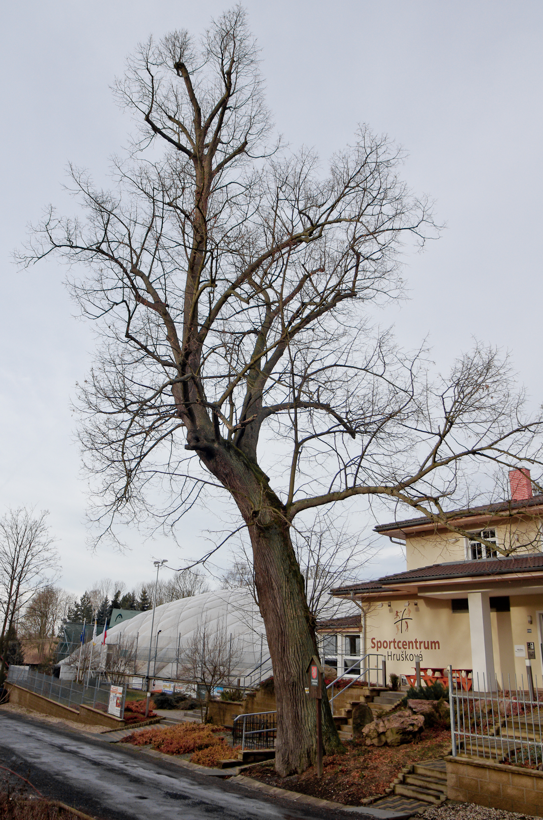 Hrušková, okres Sokolov, památná lípa u pomníčku, dutý kmen, nepravidelná koruna, jež se naklání nad silnici v obci, výška 22 m, obvod kmene 378 cm (údaje z roku 2007)